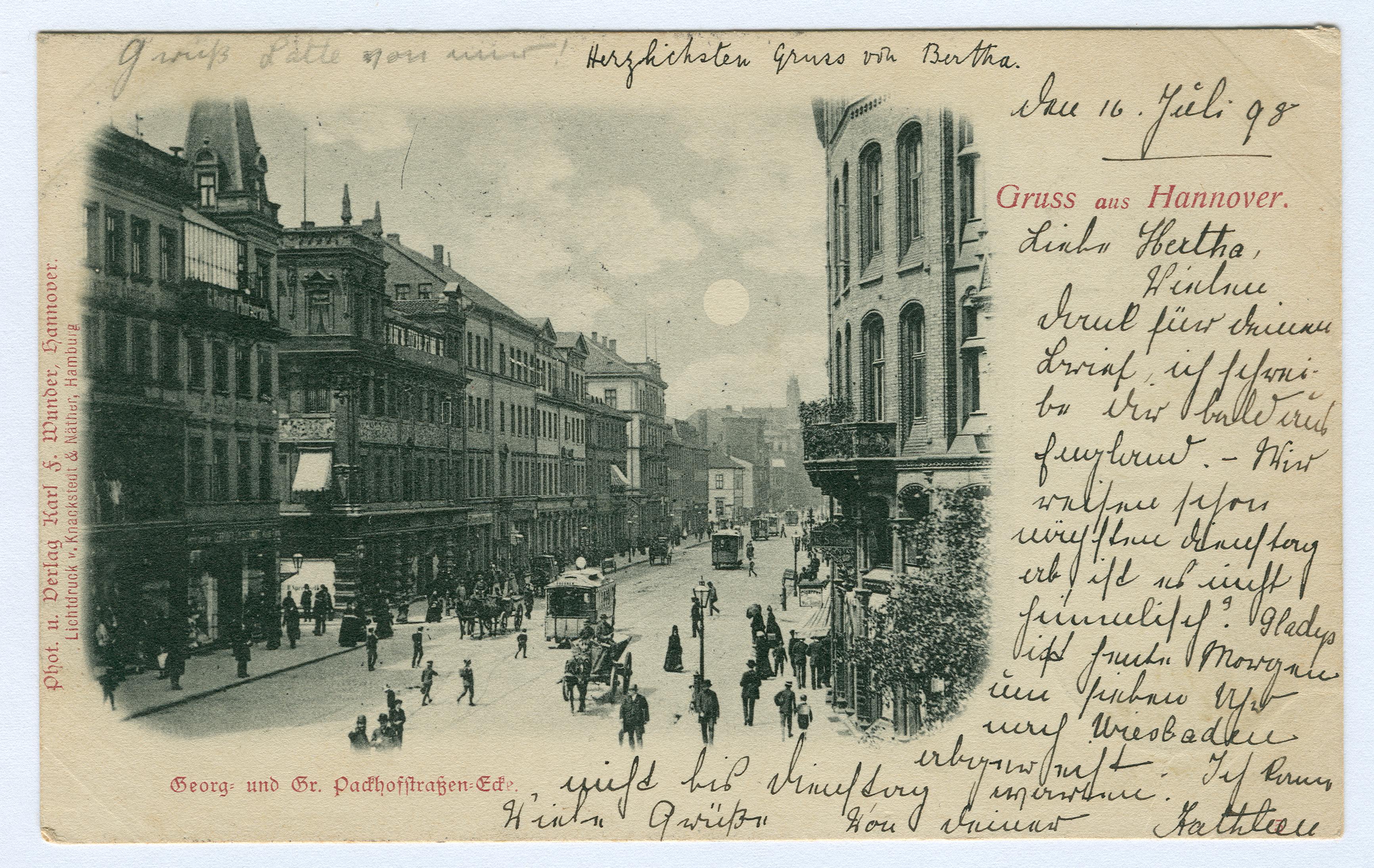 Georgstraße in Hannover um 1898. Handschriftlicher Mitteilungstext: "den 16. Juli 98. Liebe Hertha, Vielen Dank für Deinen Brief, ich schreibe Dir bald aus England. - Wir reisen schon nächsten Dienstag ab, ist es nicht himmlisch? Gladys ist heute Morgen um sieben Uhr nach Wiesbaden abgereist. Ich kann nicht bis Dienstag warten. Viele Grüße von Deiner Kathleen. Grüß Lotte von mir! Herzlichen Gruß von Bertha."